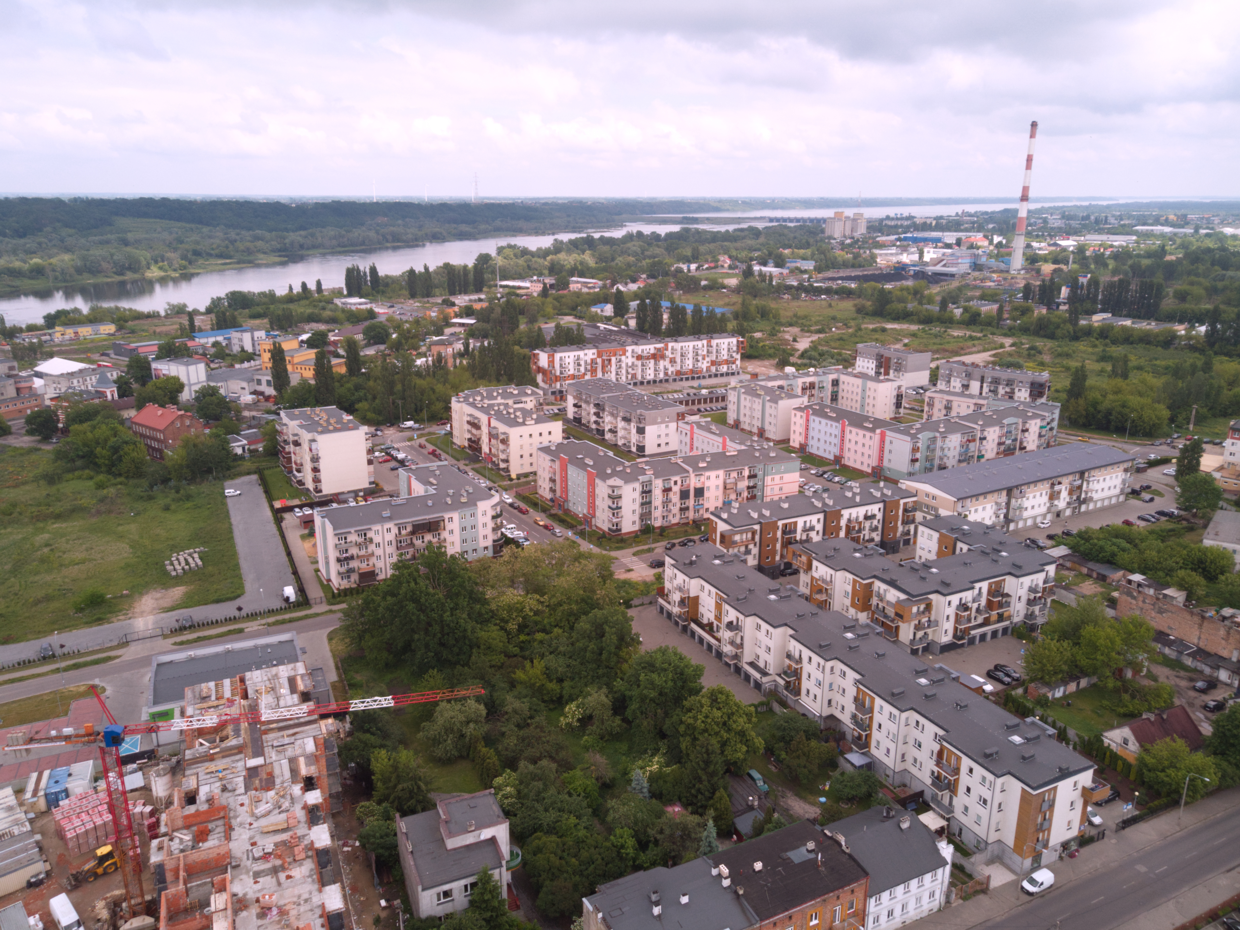 Kazimierza Wielkiego (2020 r.)